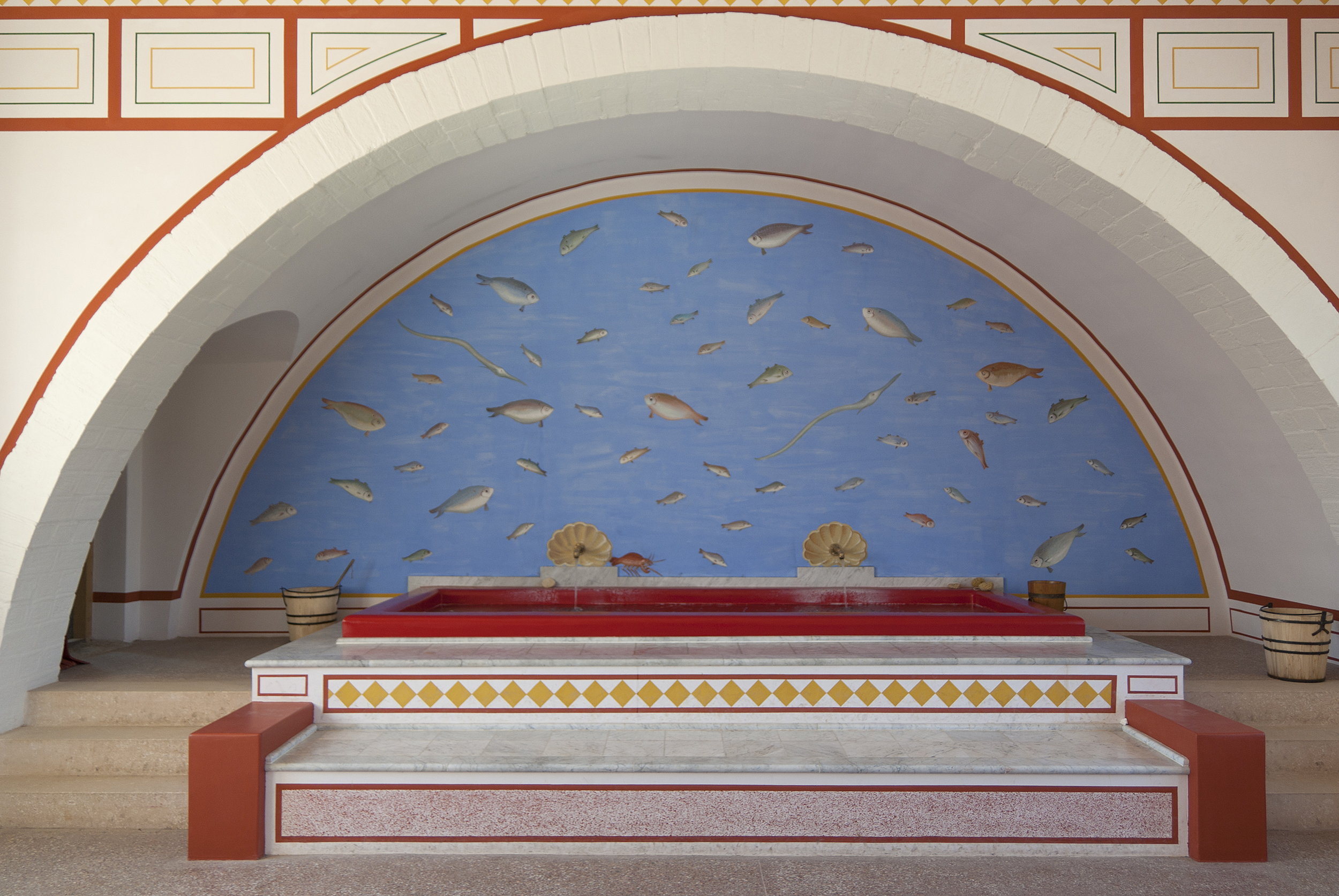 Carnuntum – Rekonstruktionen im Freilichtmuseum Caldarium - der wärmste Raum der Therme. Dieses Bild wurde anlässlich des österreichischen Tags des Denkmals 2014 in Niederösterreich eingereicht.